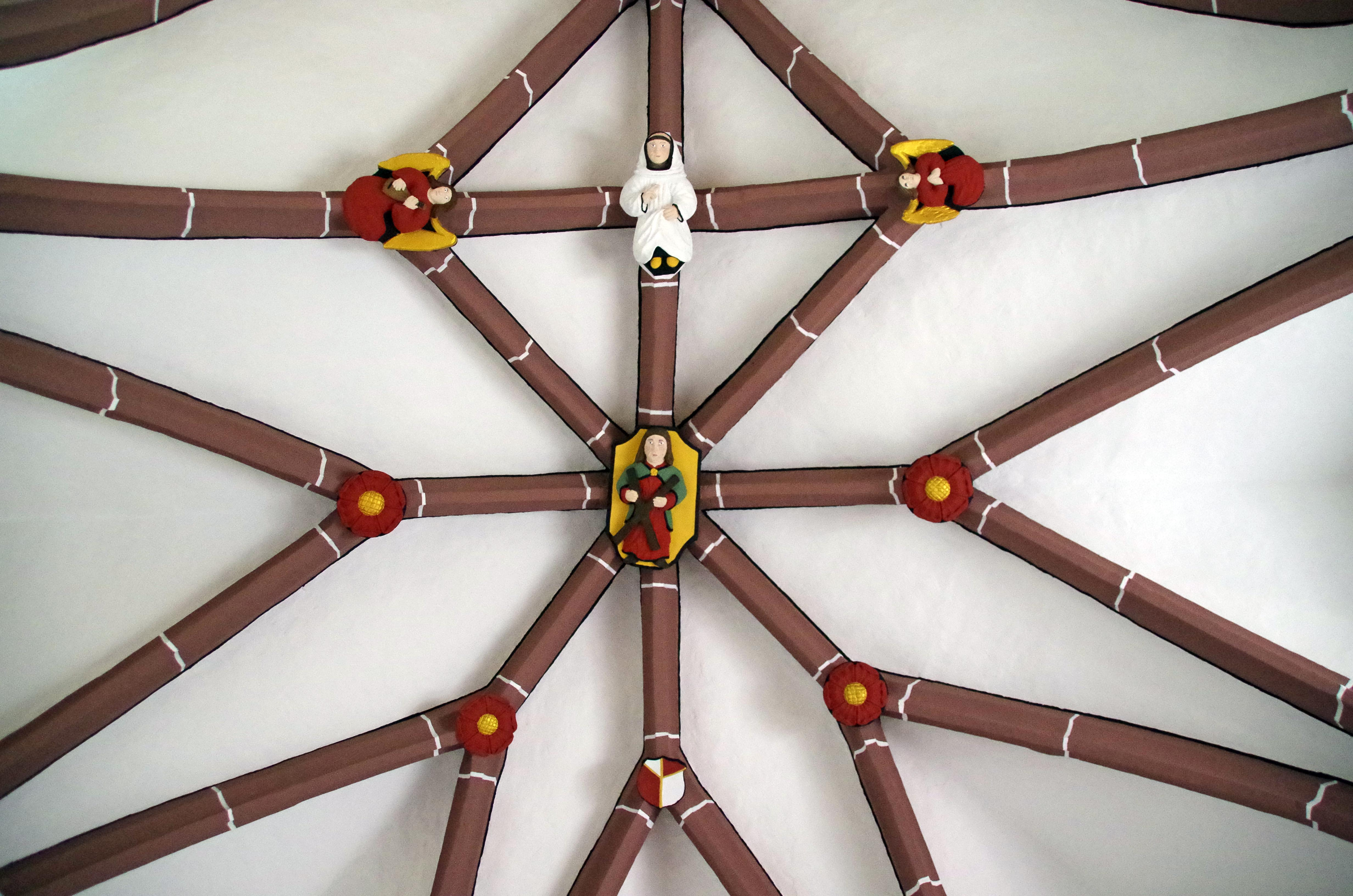 St. Brictius, gotische Gewölberippen im Chor mit figürlichen Darstellungen, östlicher Teil